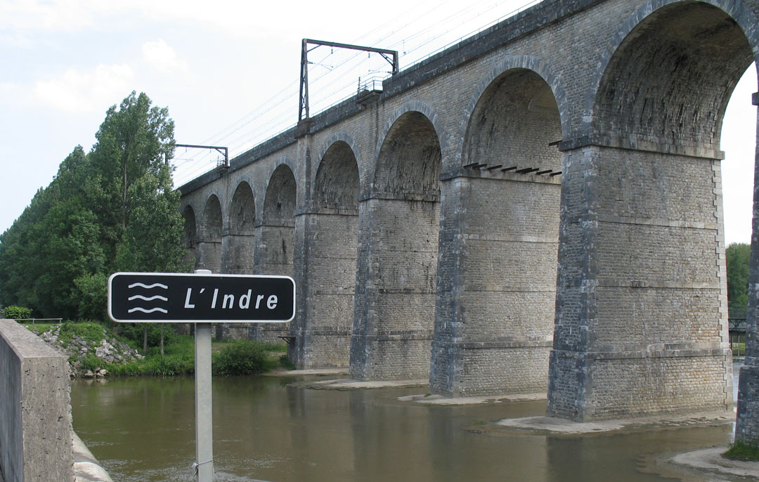 L'Indre à Monts et le viaduc de la voie ferrée, France